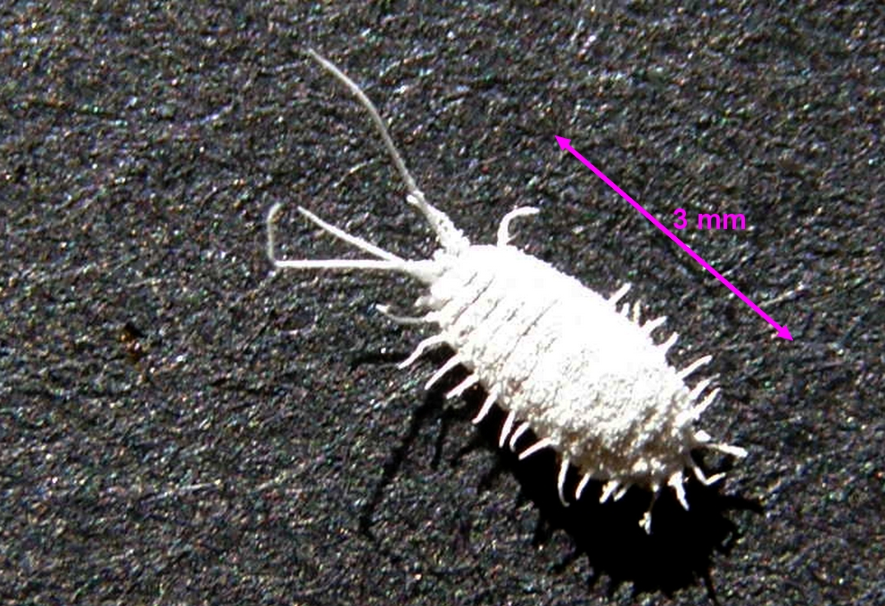 Appellation binomiale : Pseudococcus viburni, ancien nom : Pseudococcus affinis nom trivial : cochenille farineuse